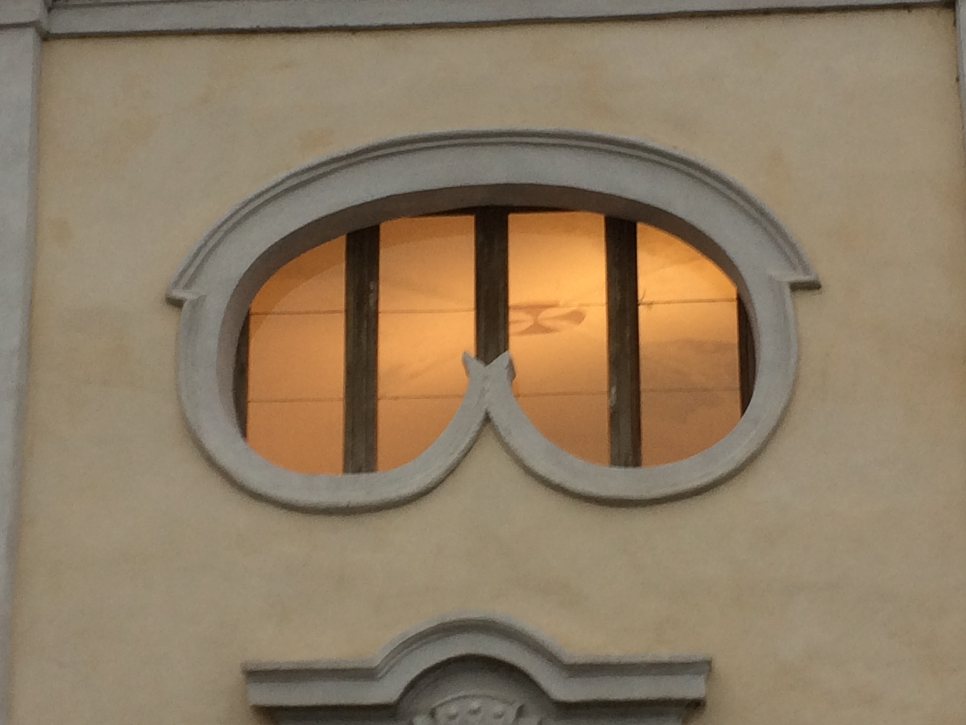 Chiesa di San Giorgio, castello di Legnano